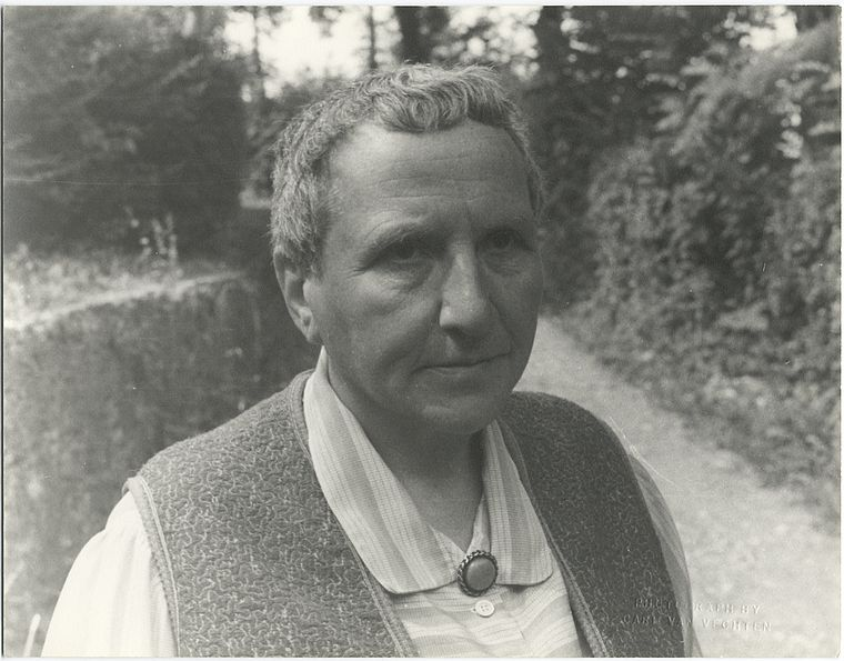 Gertrude Stein at "Les Charwelles," June 12, 1934.